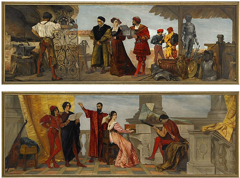 Musik und Schmiedekunst